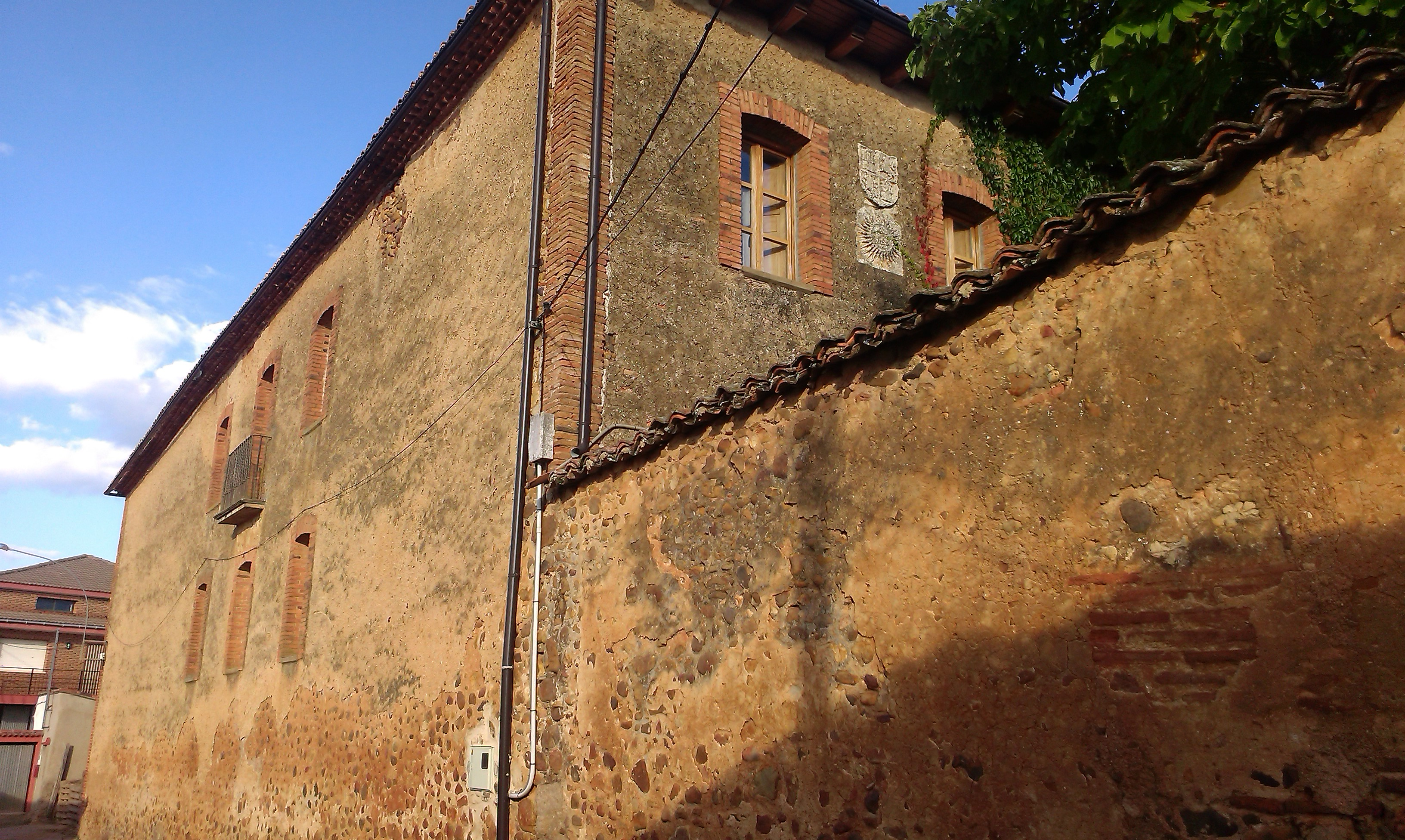 Lateral Casa Urraca Canalejas